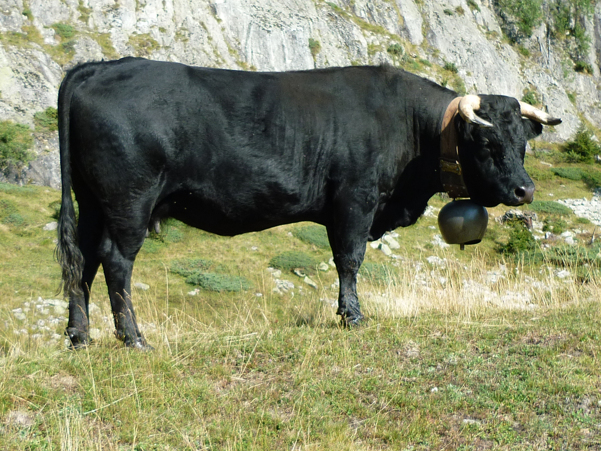 Rind der Eringerrasse, Oberaletsch, Belalp VS, Schweiz